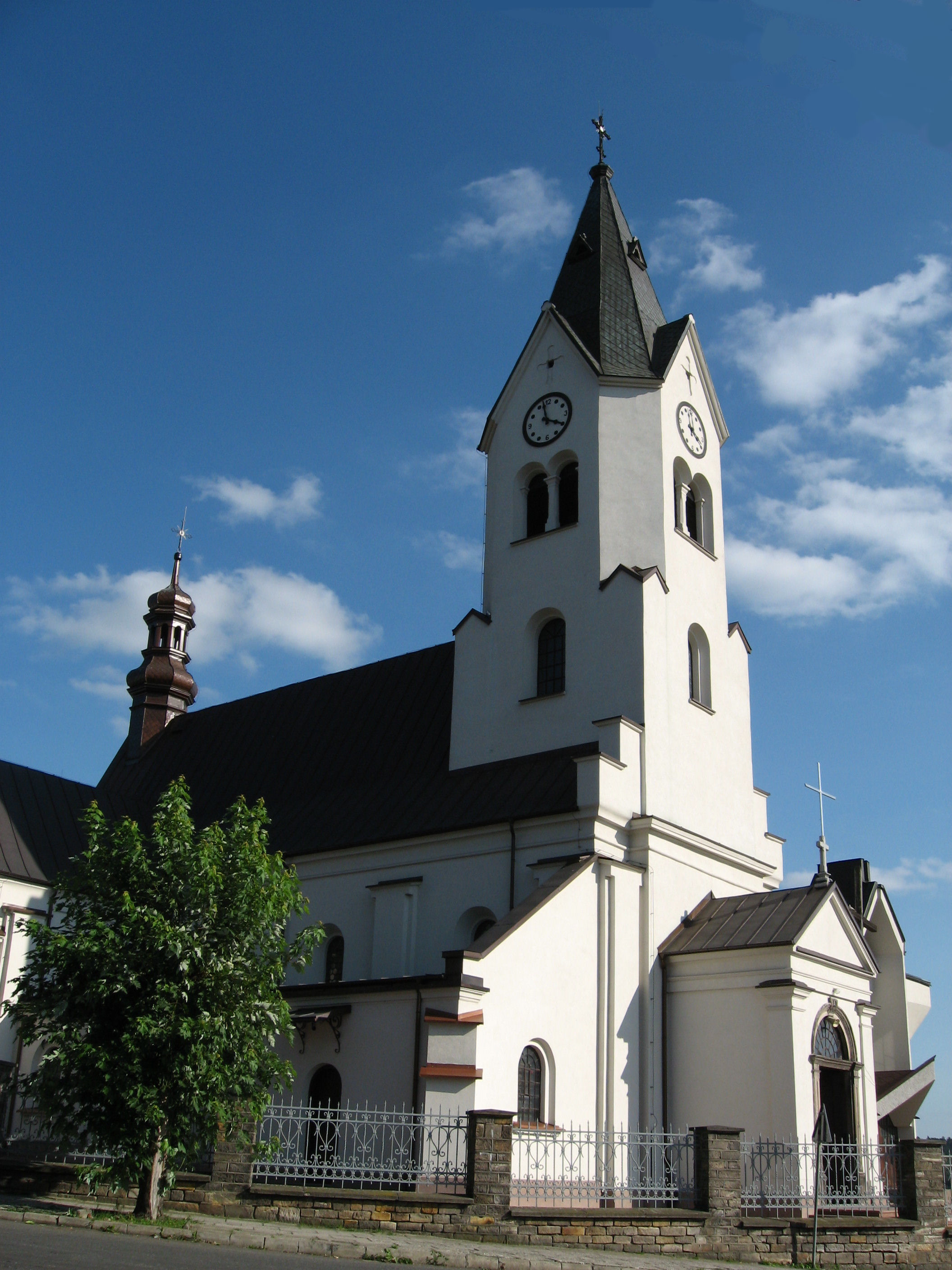 Kościół pod wezwaniem Św. Trójcy w Starachowicach (zabytek nr rejestr. A.826)